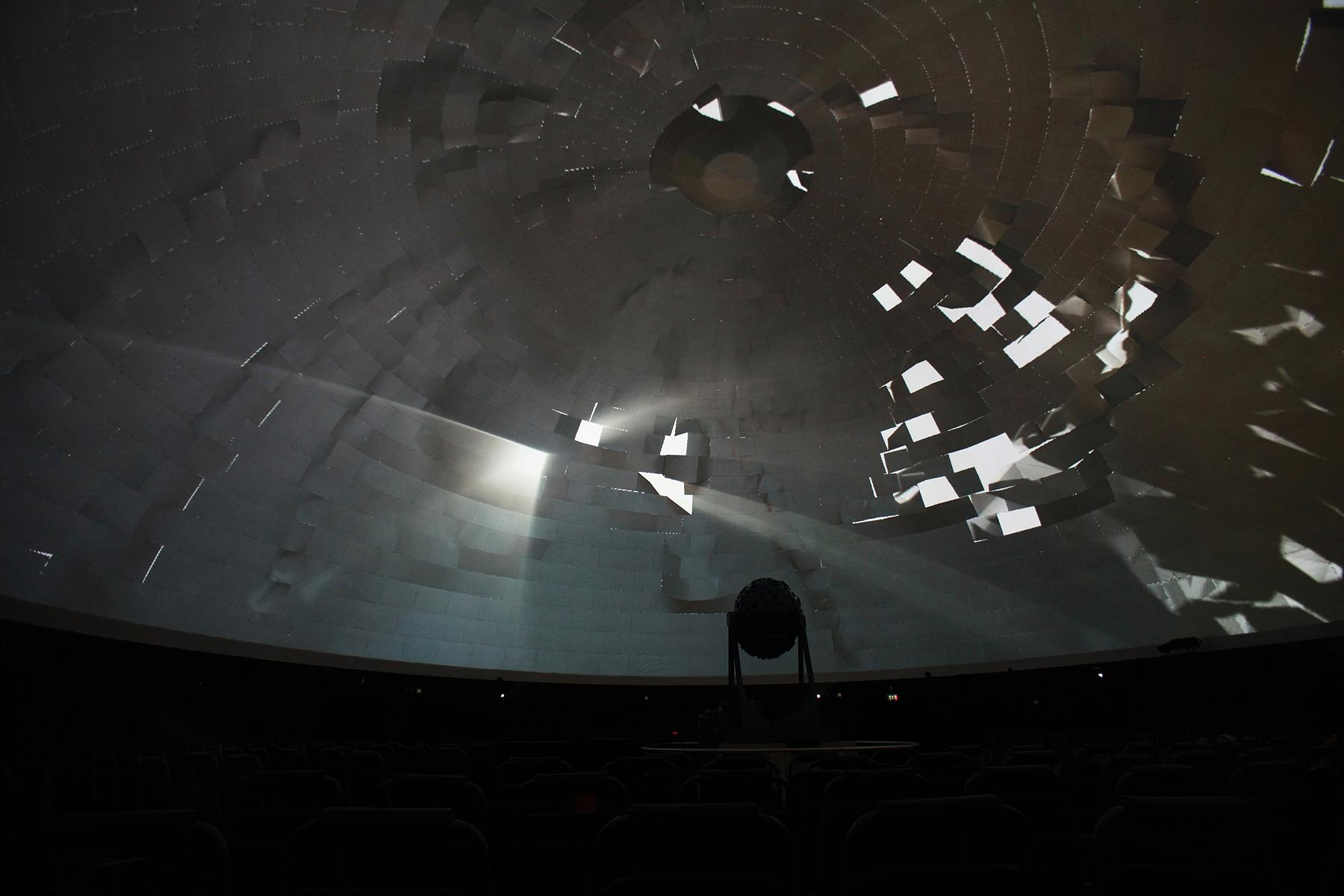 Aufnahme vom studentischen Screening für das FullDome Festival 2012 im Zeiss Planetarium Jena